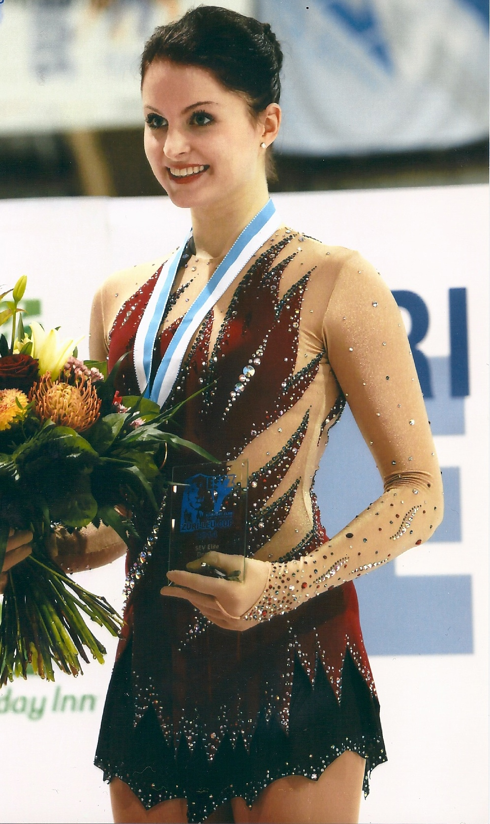 Christina Niederer - Zürcher Kantonalmeisterin 2014